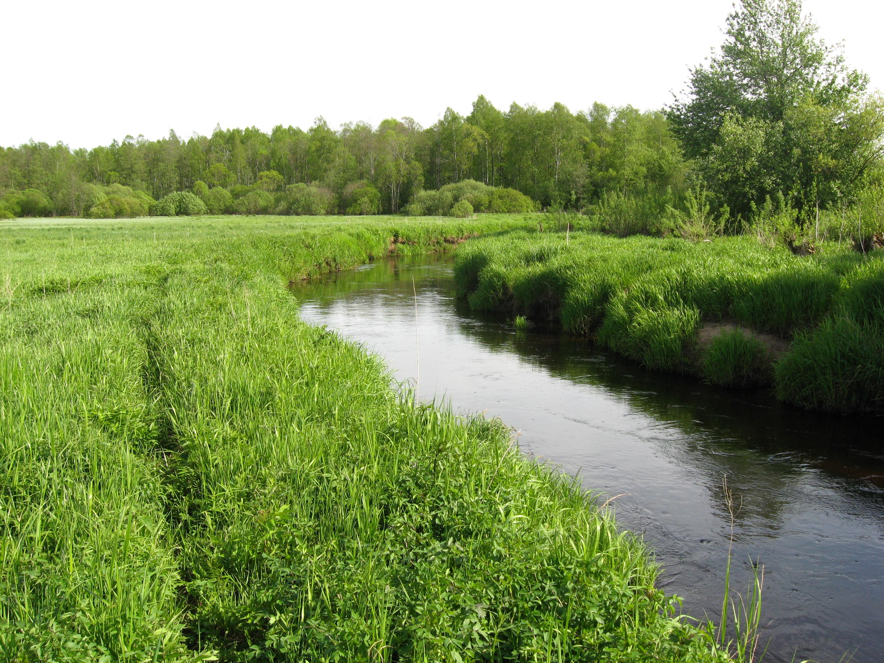 Река Яня в среднем течении.